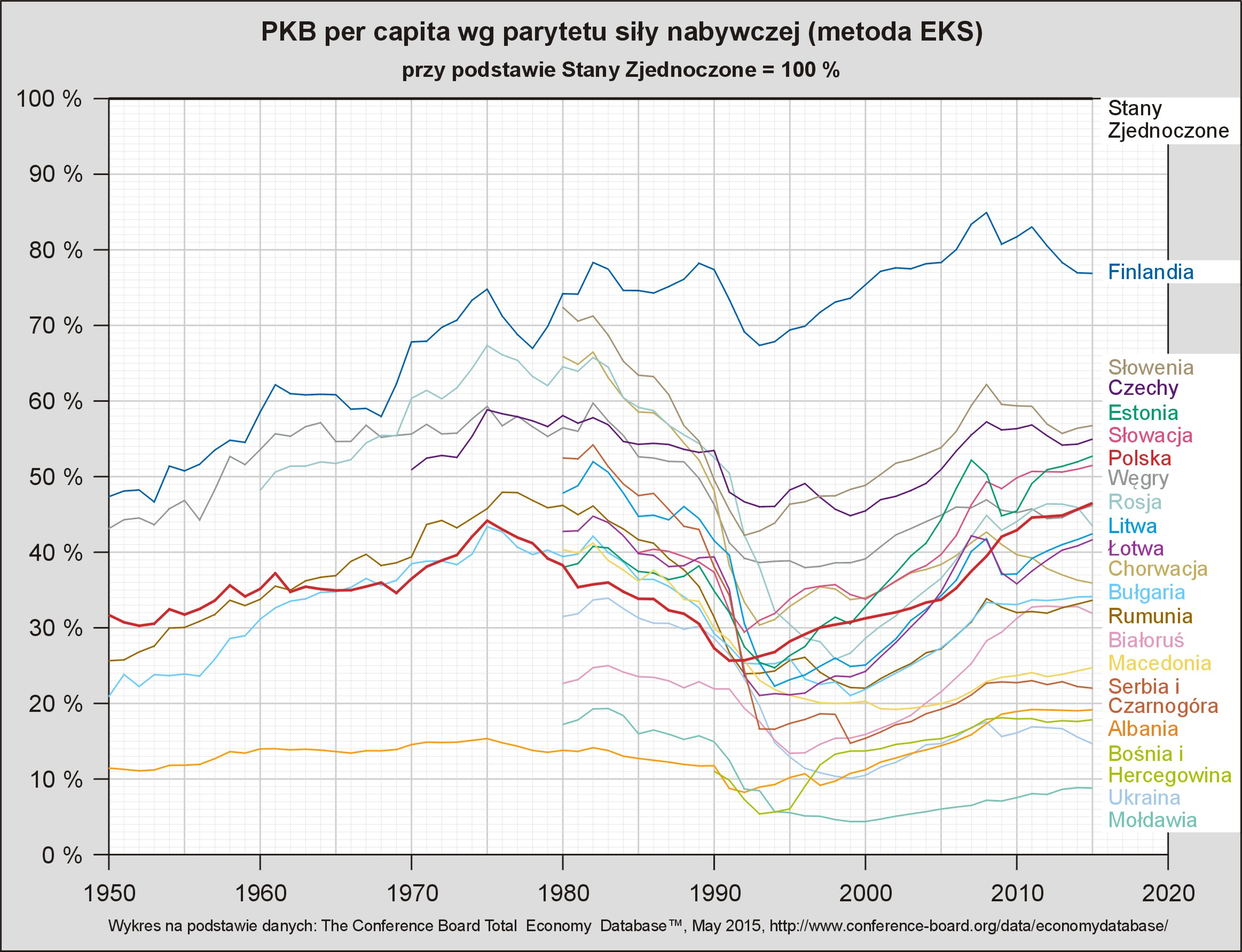 PKB per capita wg parytetu siły nabywczej (metoda EKS) państw Europy Środkowo-Wschodniej i Finlandii przy podstawie Stany Zjednoczone = 100 %. Wykres na podstawie danych: The Conference Board Total Economy Database™, May 2015, - "Output, Labor, and Labor Productivity, 1950-2015" (GDP-Capita EKS).